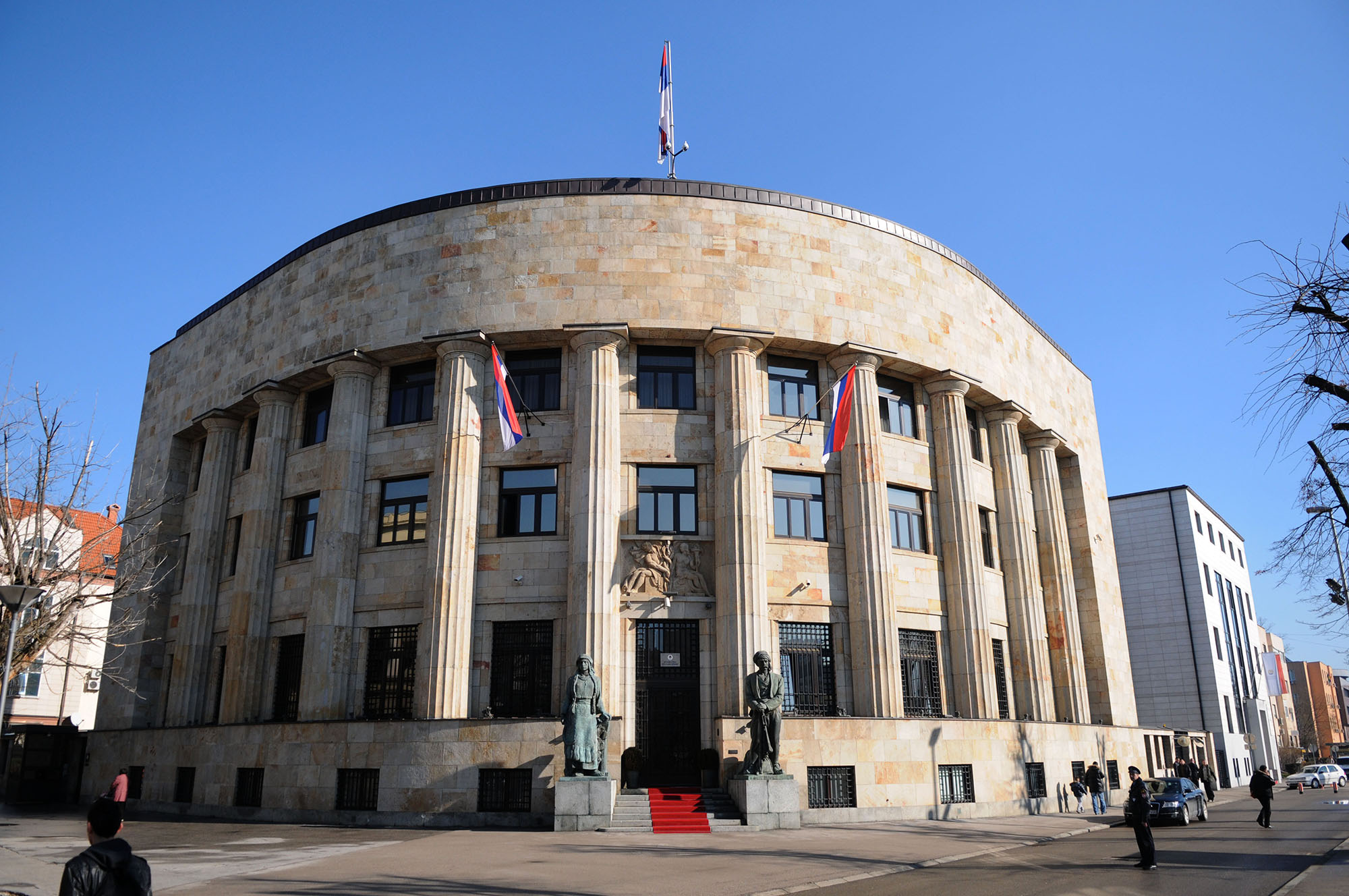 hipotekarna banka palata predsjednika RS This image was uploaded as part of Trace of Soul 2015.